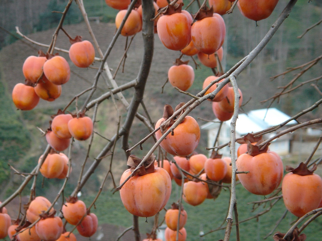 Dispyros kaki